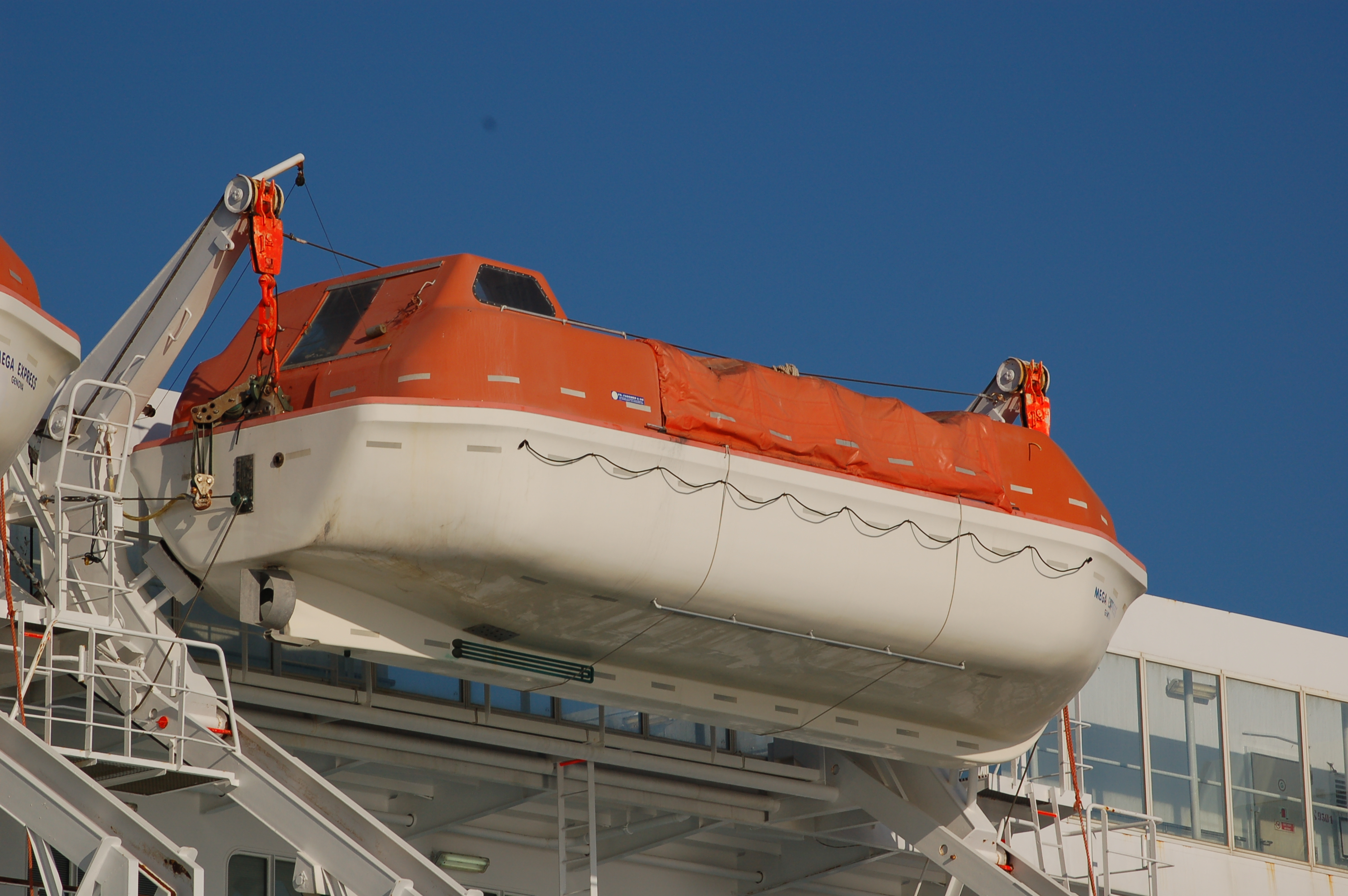 Canot de secours sur un ferry de Corsica Ferries